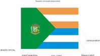 Bandeira do Município de Aparecida do Rio Doce/GO